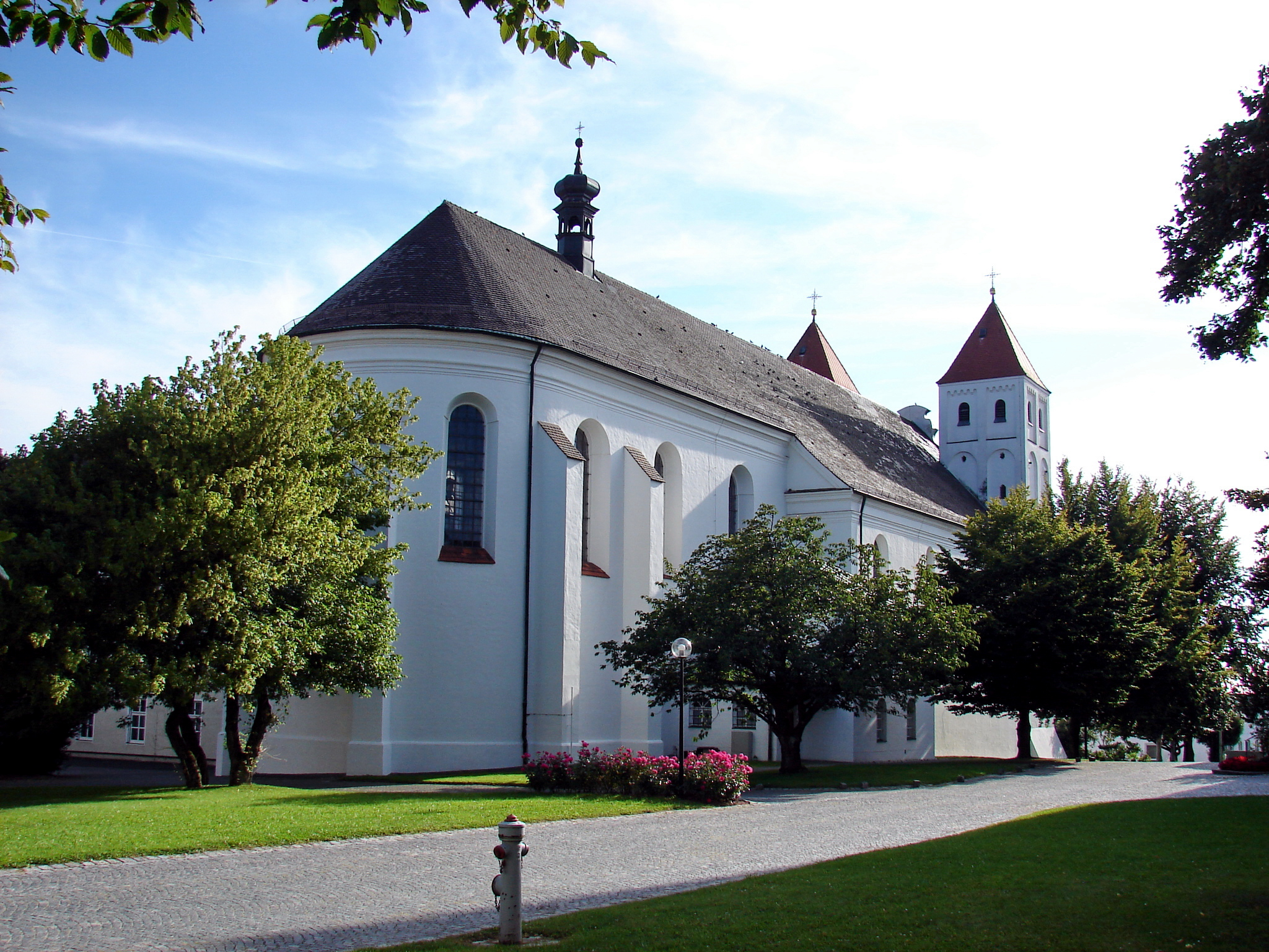 Die dem Kloster angehörige Basilika wurde 1109 begonnen und erhielt in der Mitte des 18. Jahrhunderts ihre heutige Rokokoausstattung. In der Pfarrkirche St. Johannes befindet sich ein Hochaltar von Ignaz Günther.